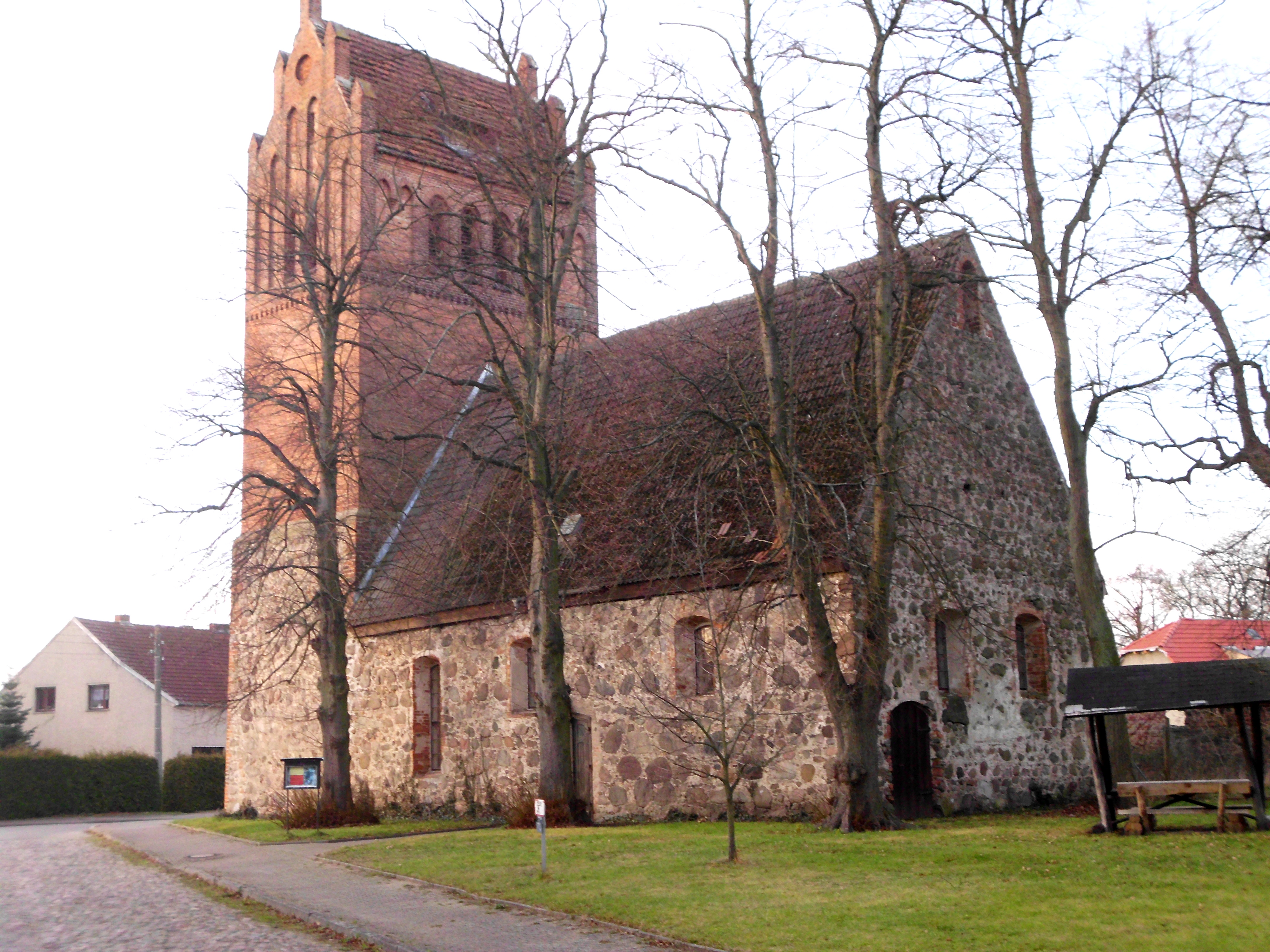 denkmalgeschützte Dorfkirche in Demerthin, Gemeinde Gumtow